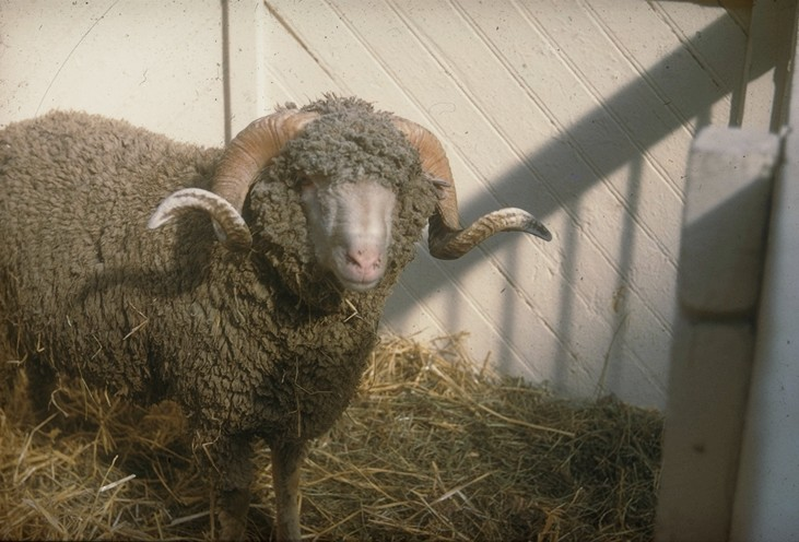 Bélier Mérinos d'Arles Salon d'Agriculture de Paris 1962